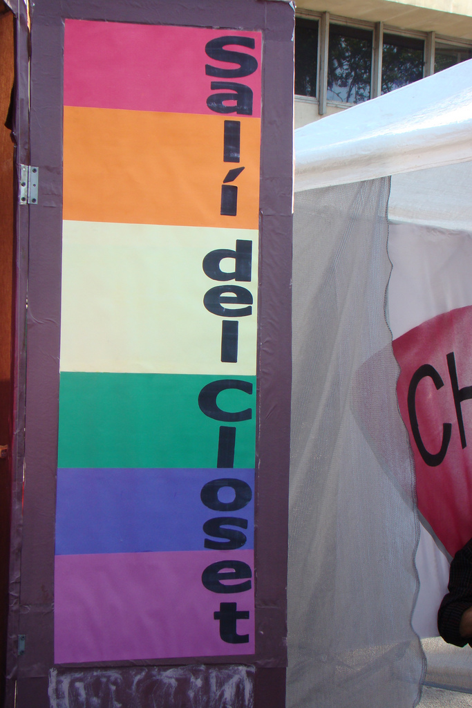 Foto tomada el dia sabado 01/11/2008, durante la marcha del orgullo gay en la ciudad de Buenos Aires - Argentina